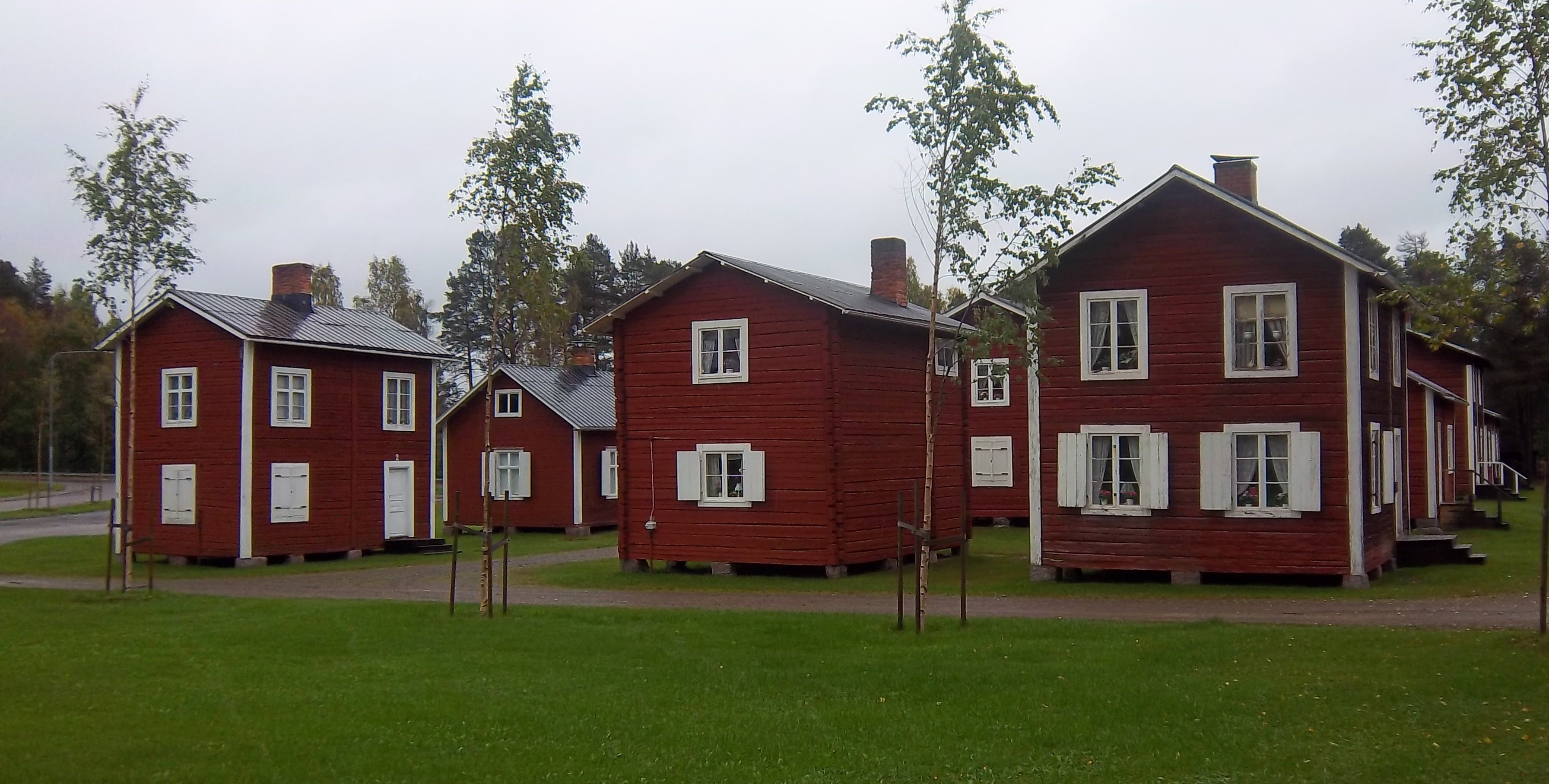 Älvsbyns kyrkstad, fotograferad mellan kyrkstaden och kyrkan en höstdag